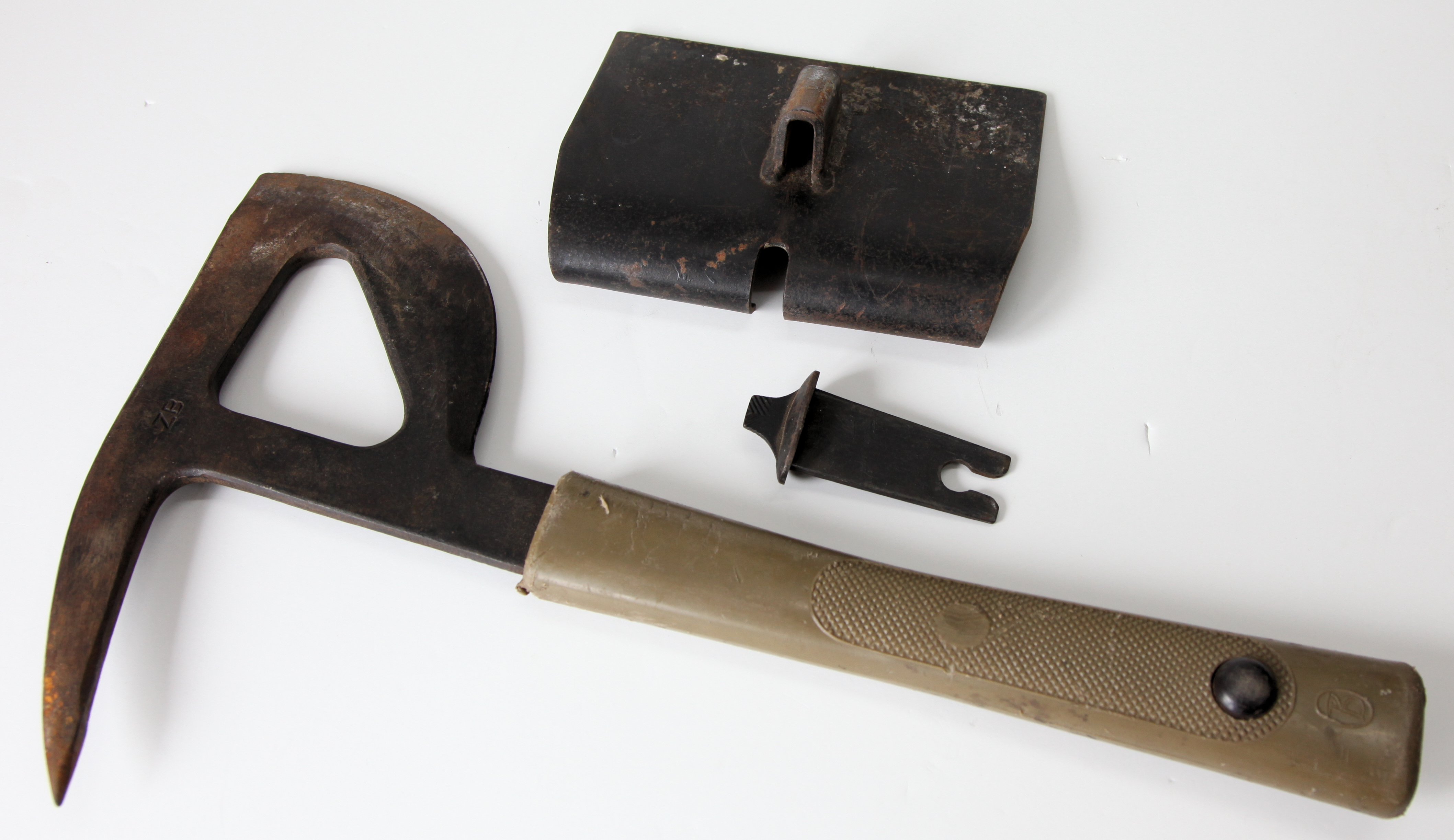 Bergungsbeil THW